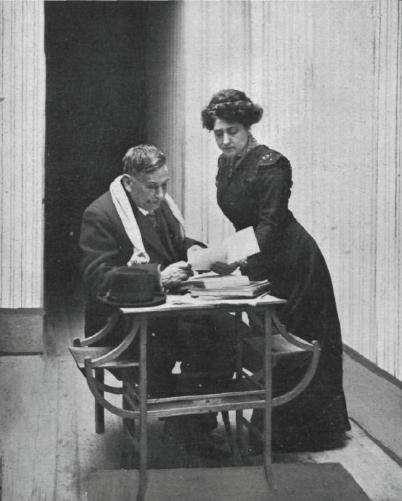 El escritor Benito Pérez Galdós y la actriz Carmen Cobeña en un receso del ensayo de la obra de teatro Casandra, escrita por el primero